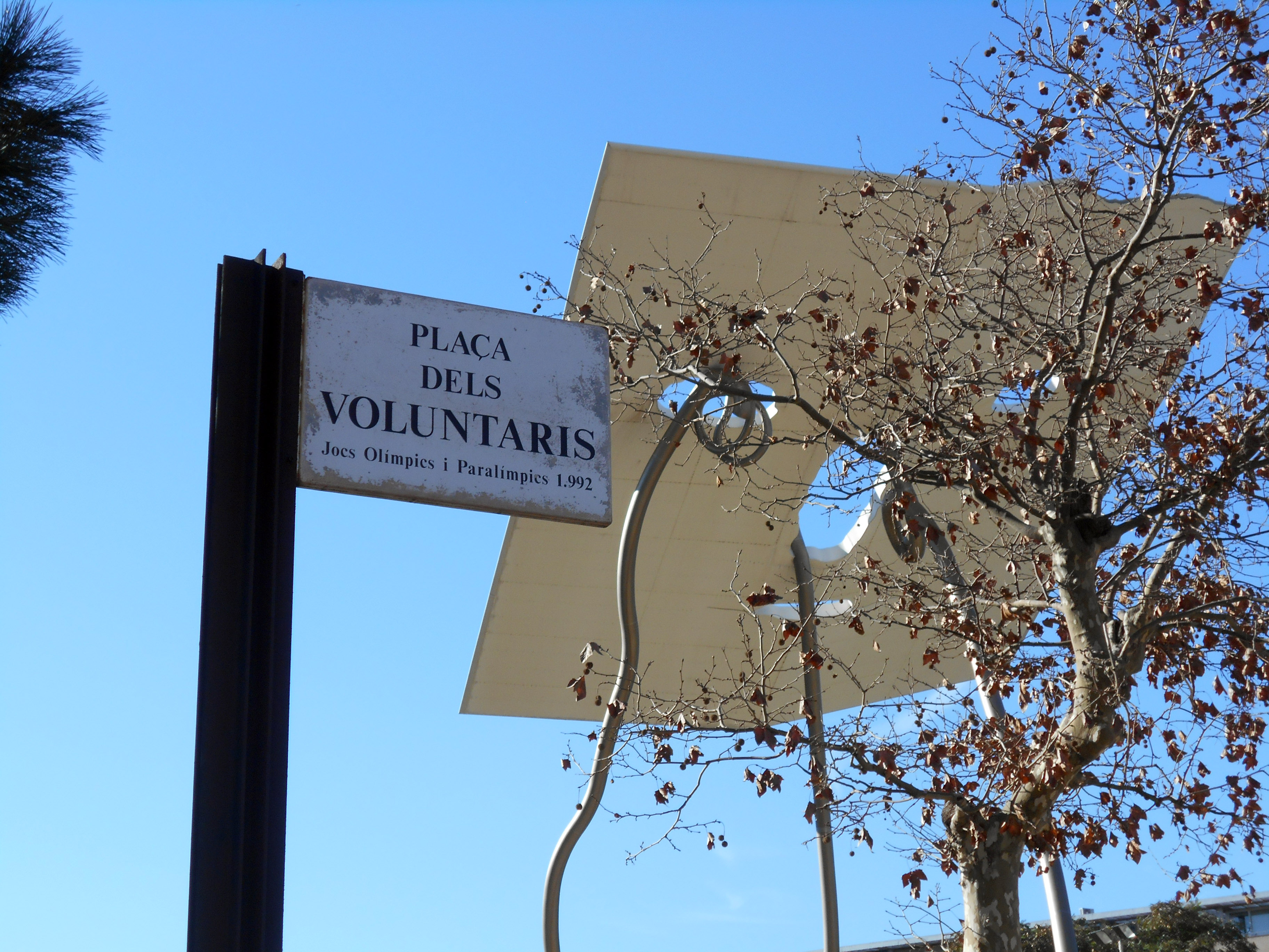 Plaza de los Voluntarios.